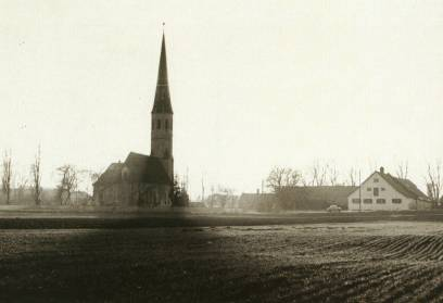 Saint Stephen's in Baumkirchen (Munich, Bavaria), right hand "Vogl-Hof"